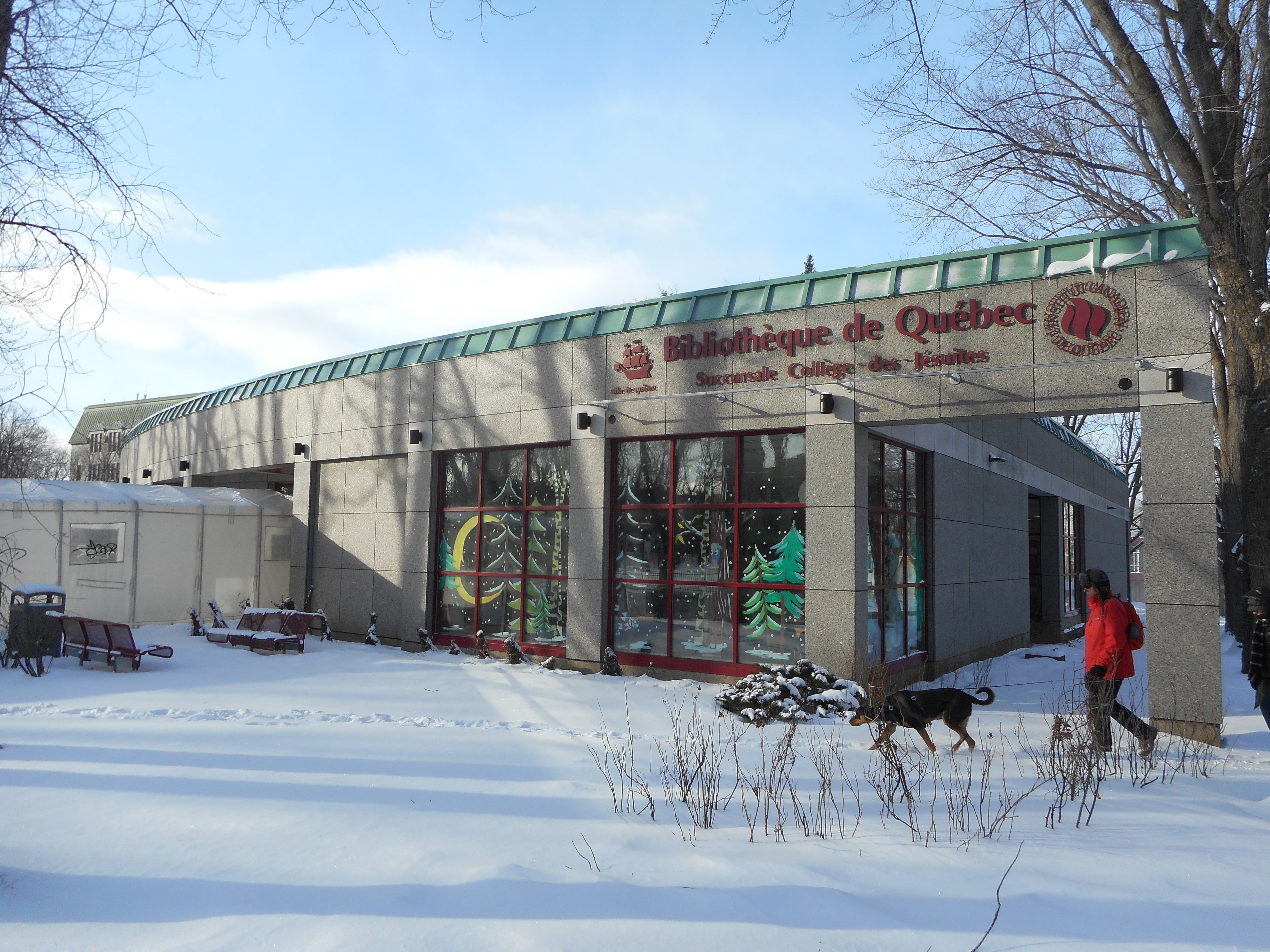 Bibliothèque Collège-des-Jésuites (Bibliothèque de Québec), 1120, boulevard René-Lévesque Ouest, Québec